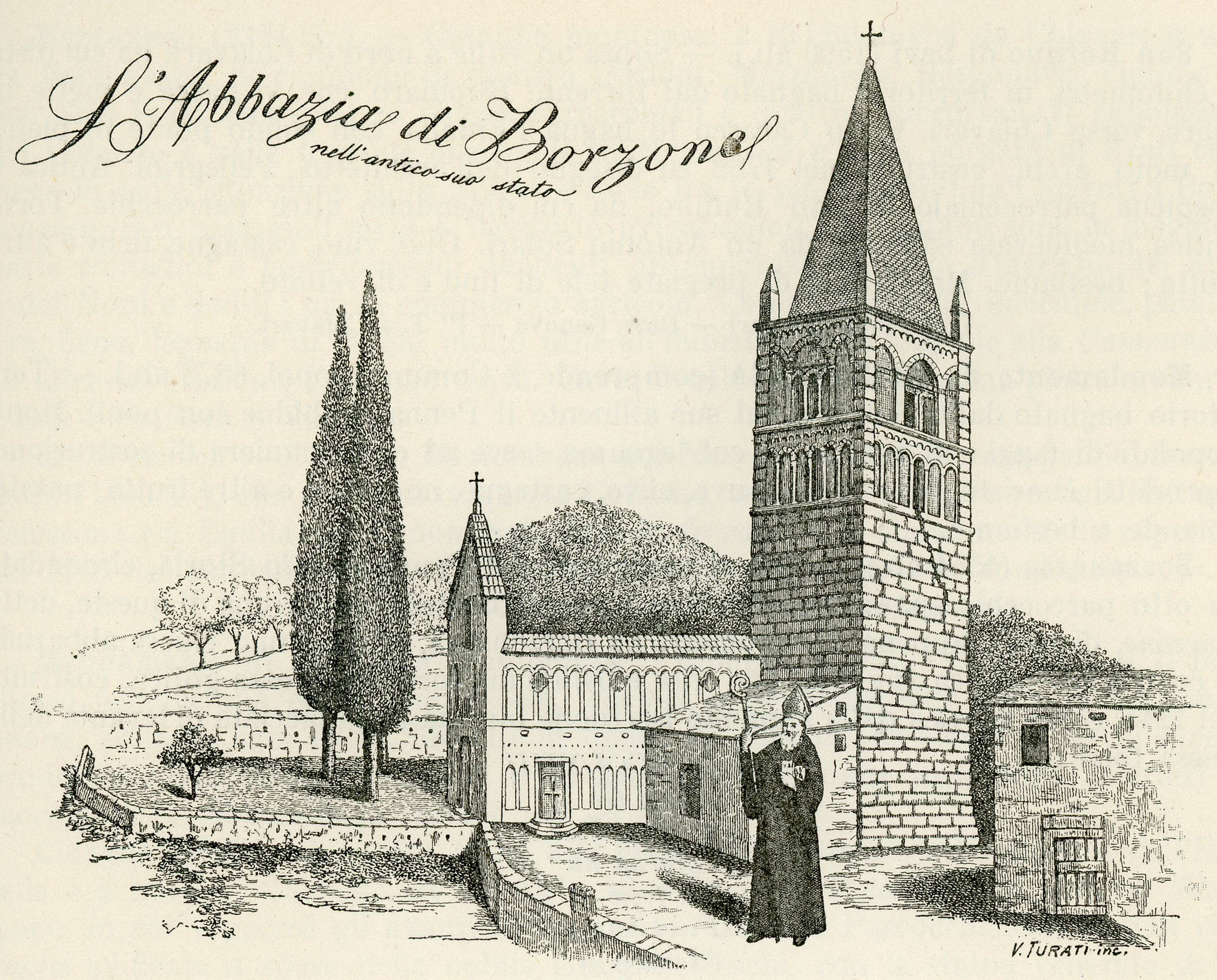 Borzone: Abbazia di Sant'Andrea (incisione).